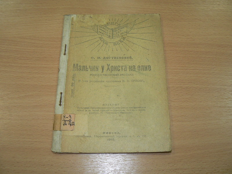 Ф.М.Достоевский, "Мальчик у Христа на ёлке", М., Издание Культурно-просветительского отдела Союза построечников новых ж.д. линий, 1919 г.